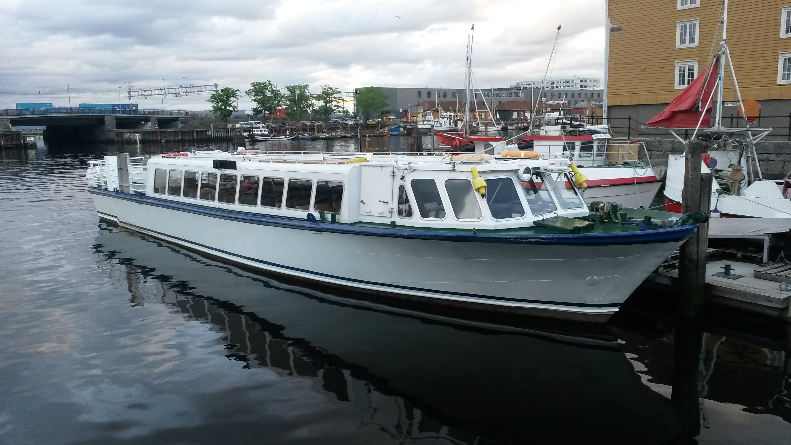 In Trondheim